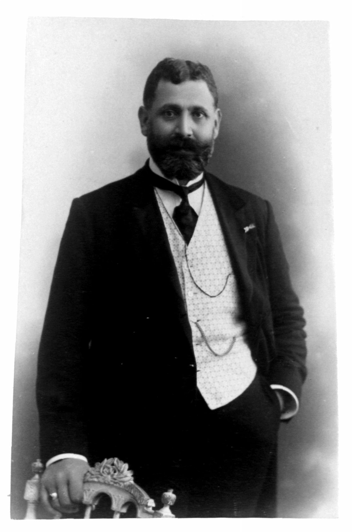 Ermeni Mebus Nazaret Dağavaryan'ın Mebusan Albümü'nden fotoğrafı.